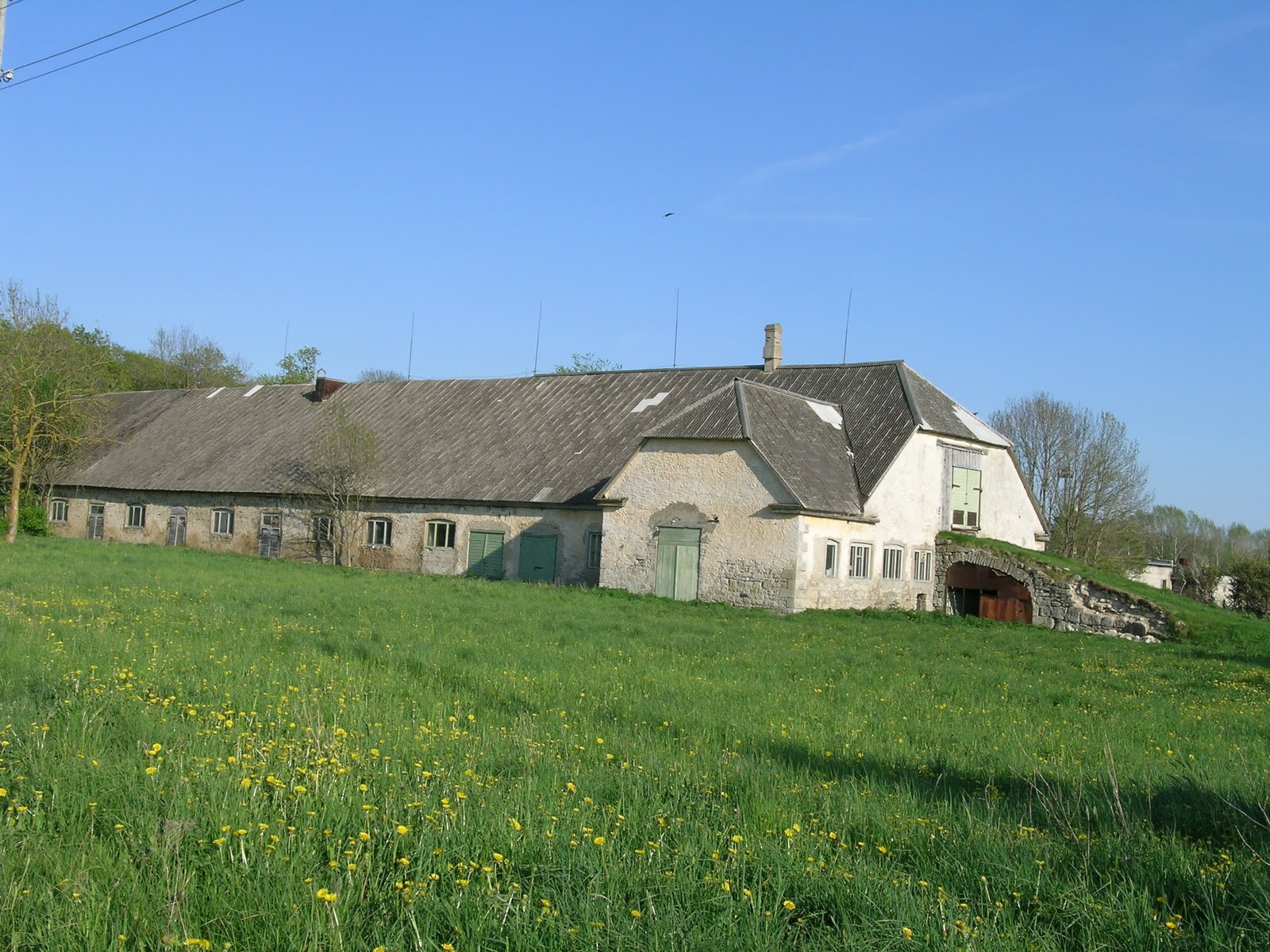 Kõljala mõisa karjalaut